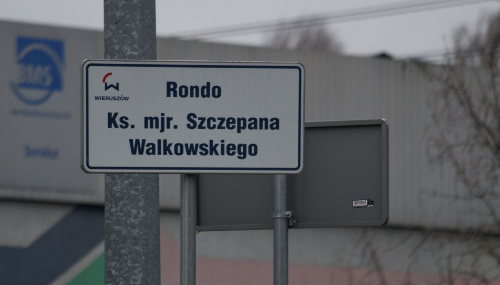 rondo ks. Walkowskiego, Wieruszów woj. łódzkie